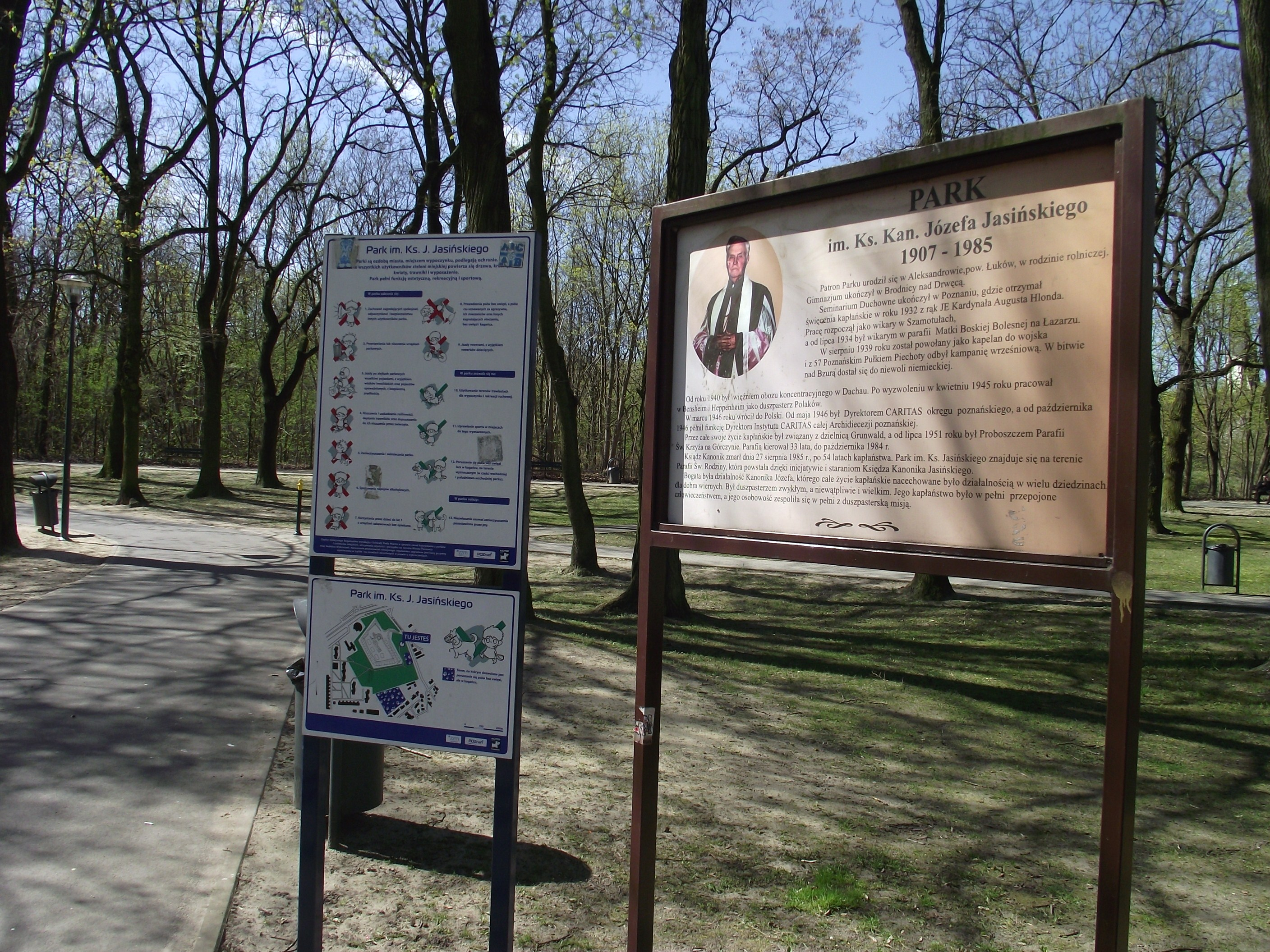 Tablice informacyjne na skraju Parku im. ks. Józefa Jasińskiego w Poznaniu (Raszyn)